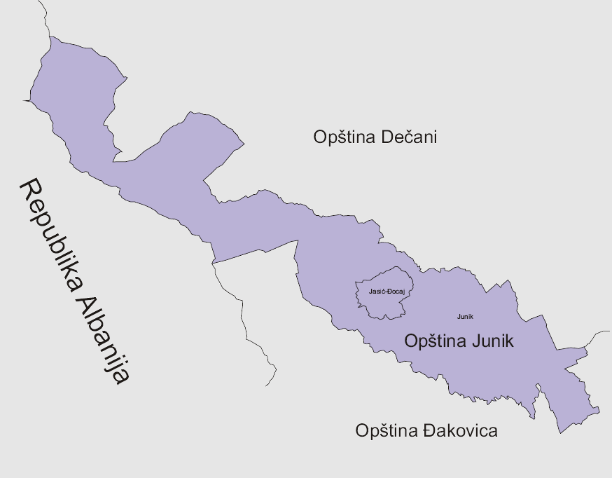 autor Varjačić Vladimir